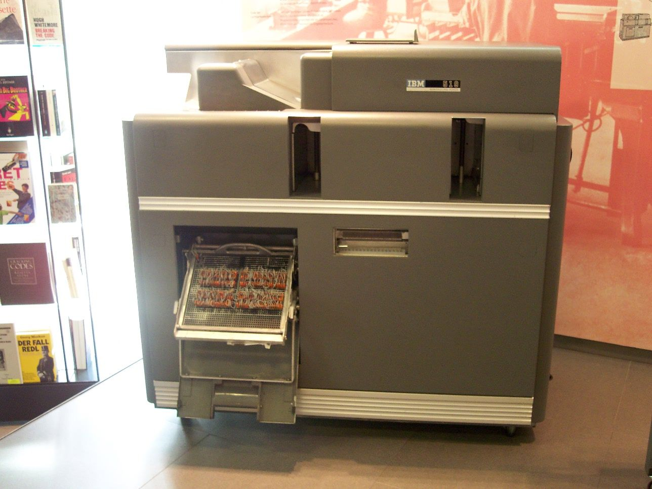 Datenverarbeitung per Lochkarte